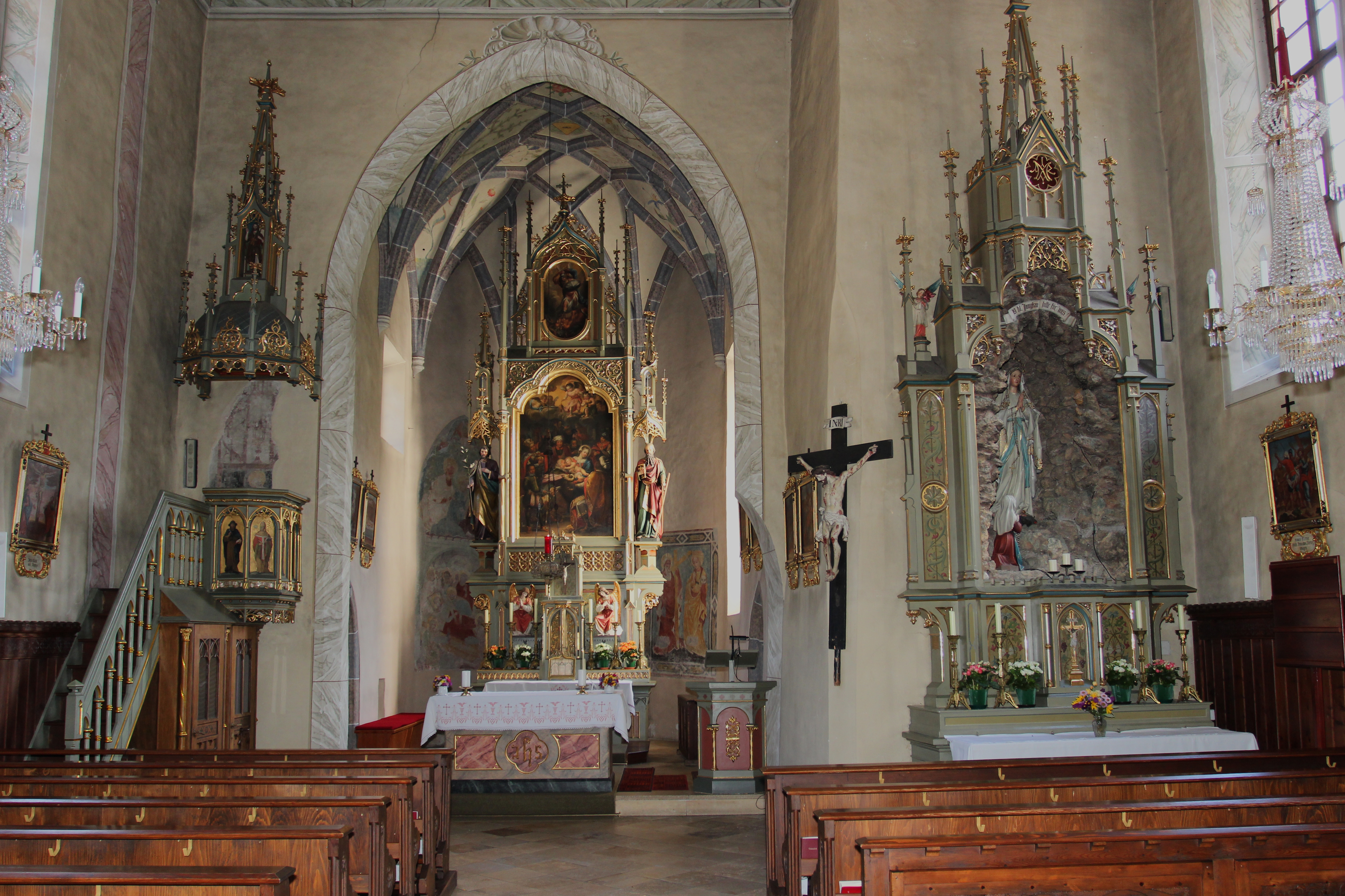 Altar der Römisch-katholische Andreaskirche Döllach in der Gemeinde Großkirchheim, Österreich.